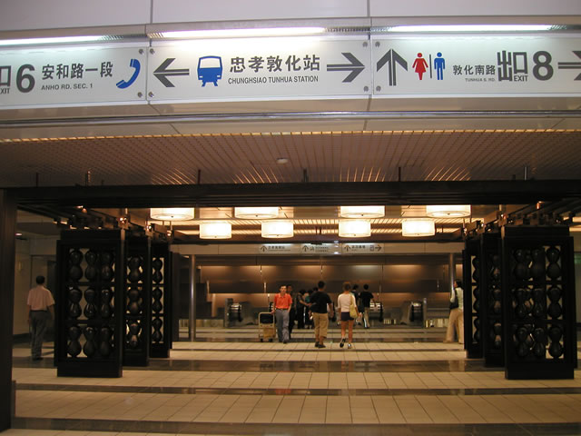 臺北市東區地下街第五廣場。